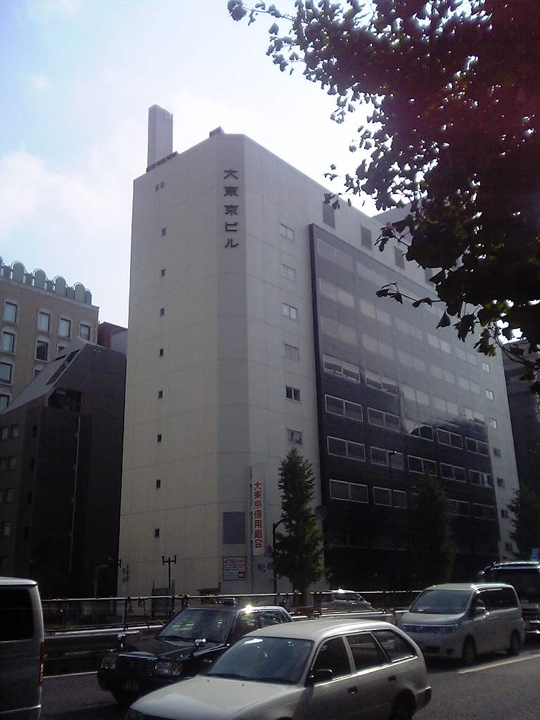 大東京信用組合本部(2009/10/31撮影)